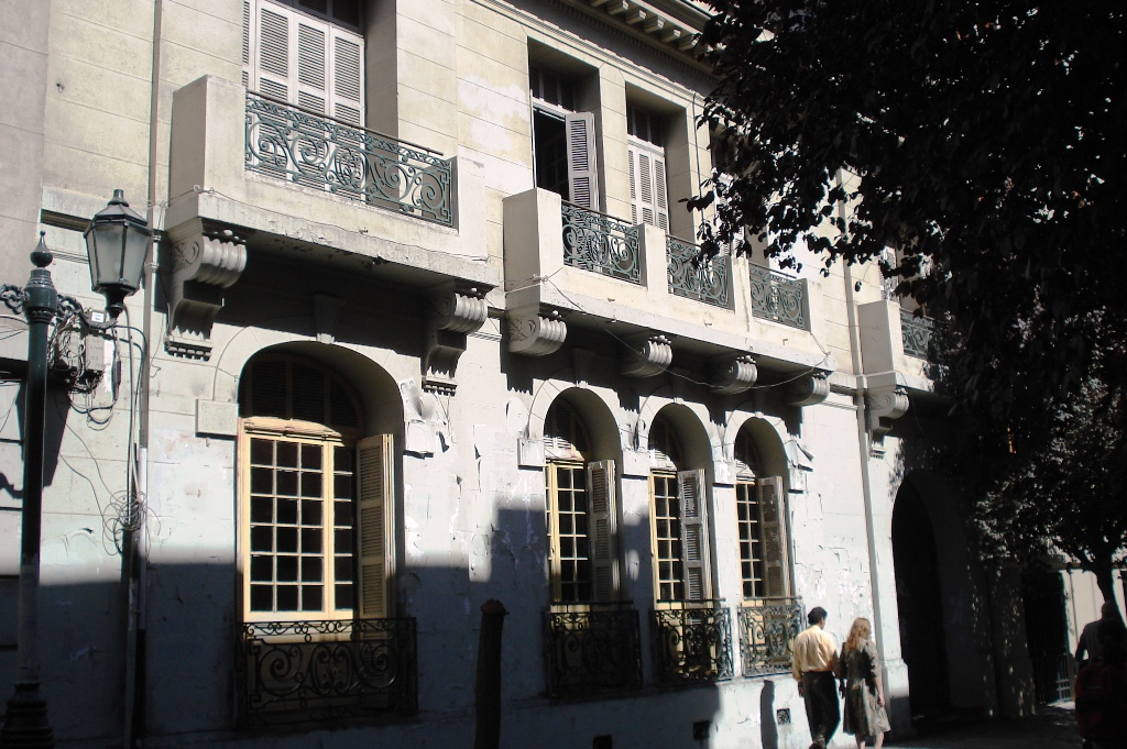 Inmueble de calle Londres Nº 40 (ex 38) en la ciudad de Santiago de Chile. Antiguo centro de detención, tortura y desaparecimiento de opositores a la dictadura de Augusto Pinochet. Actual sede del Instituto O'Higginiano.